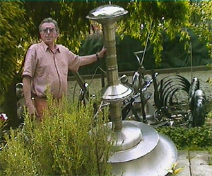 Portrait de Claude Viseux